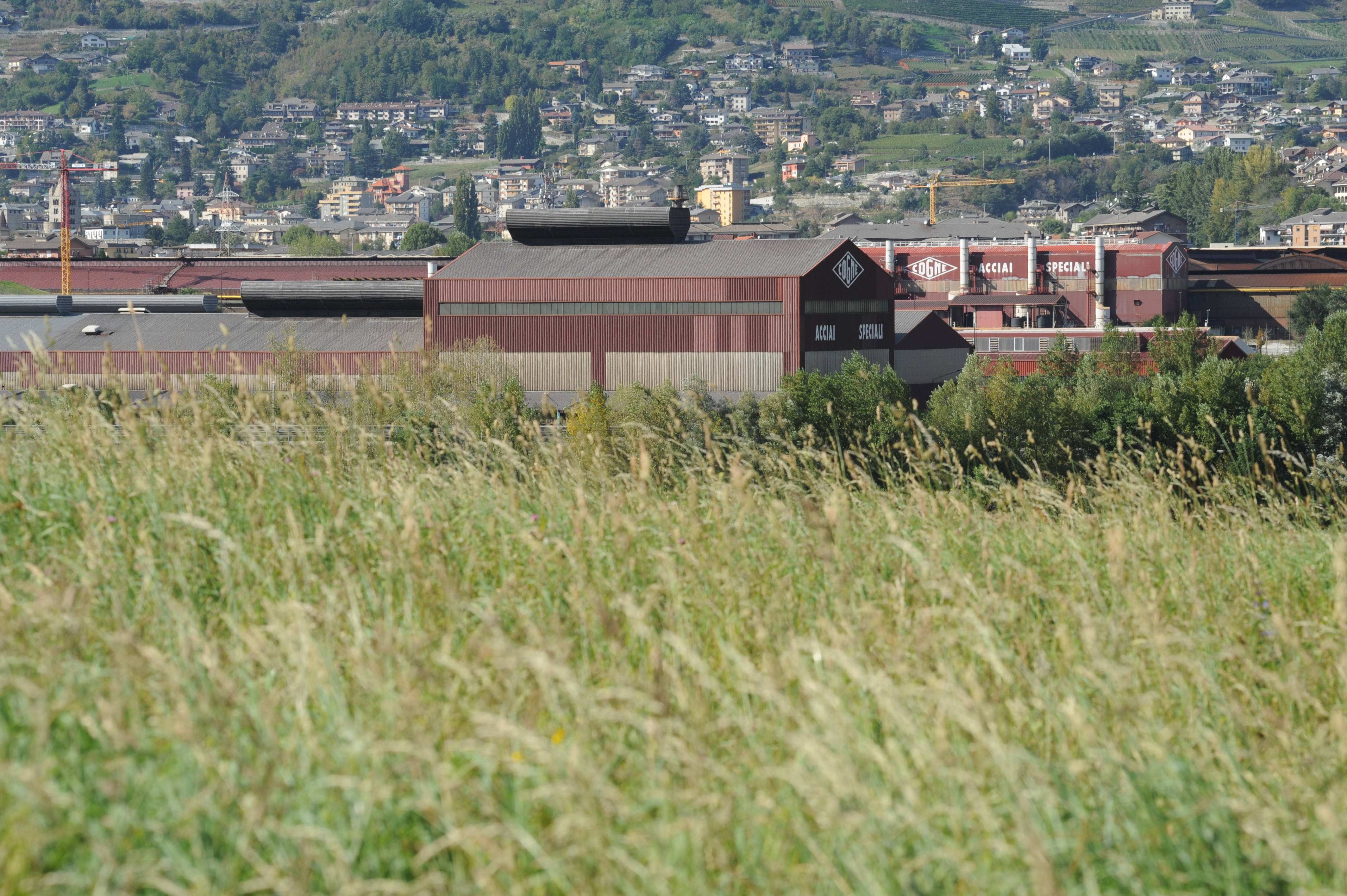 Lo stabilimento della Cogne Acciai Speciali di Aosta